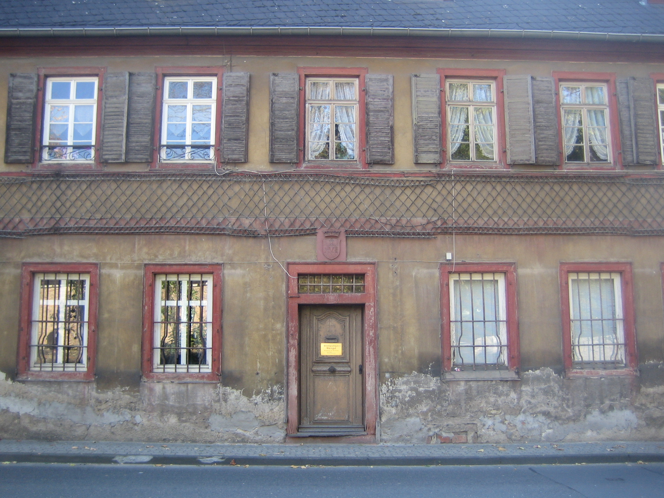 Historischer Fensterbestand oben rechts und drei Phasen der Fenstersanierung.